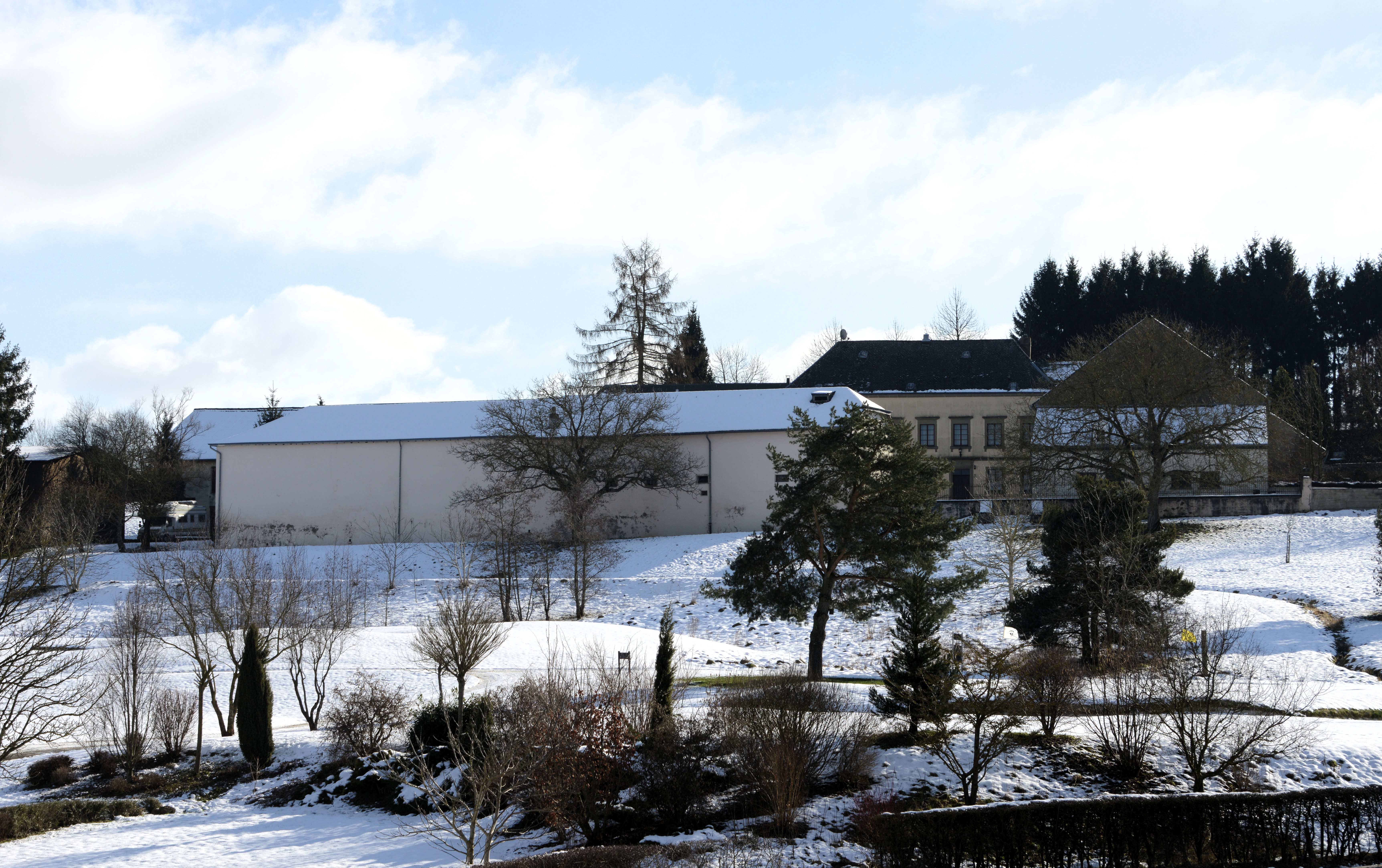 De Scheierhaff vum Kikuoka Golf Club aus gesinn.